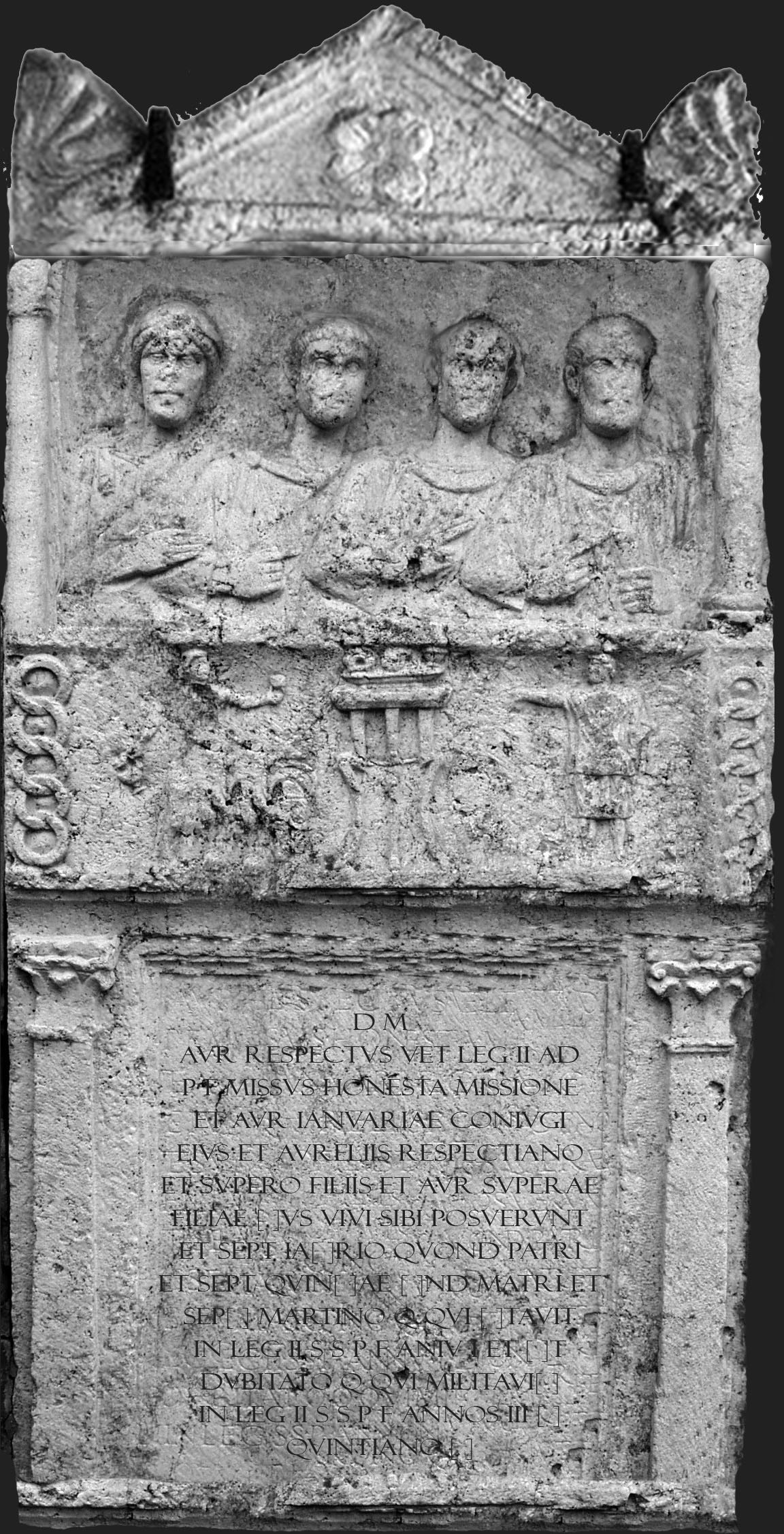 Aurelius Respectus síremléke – Fogarasy Attila rekonstrukciója